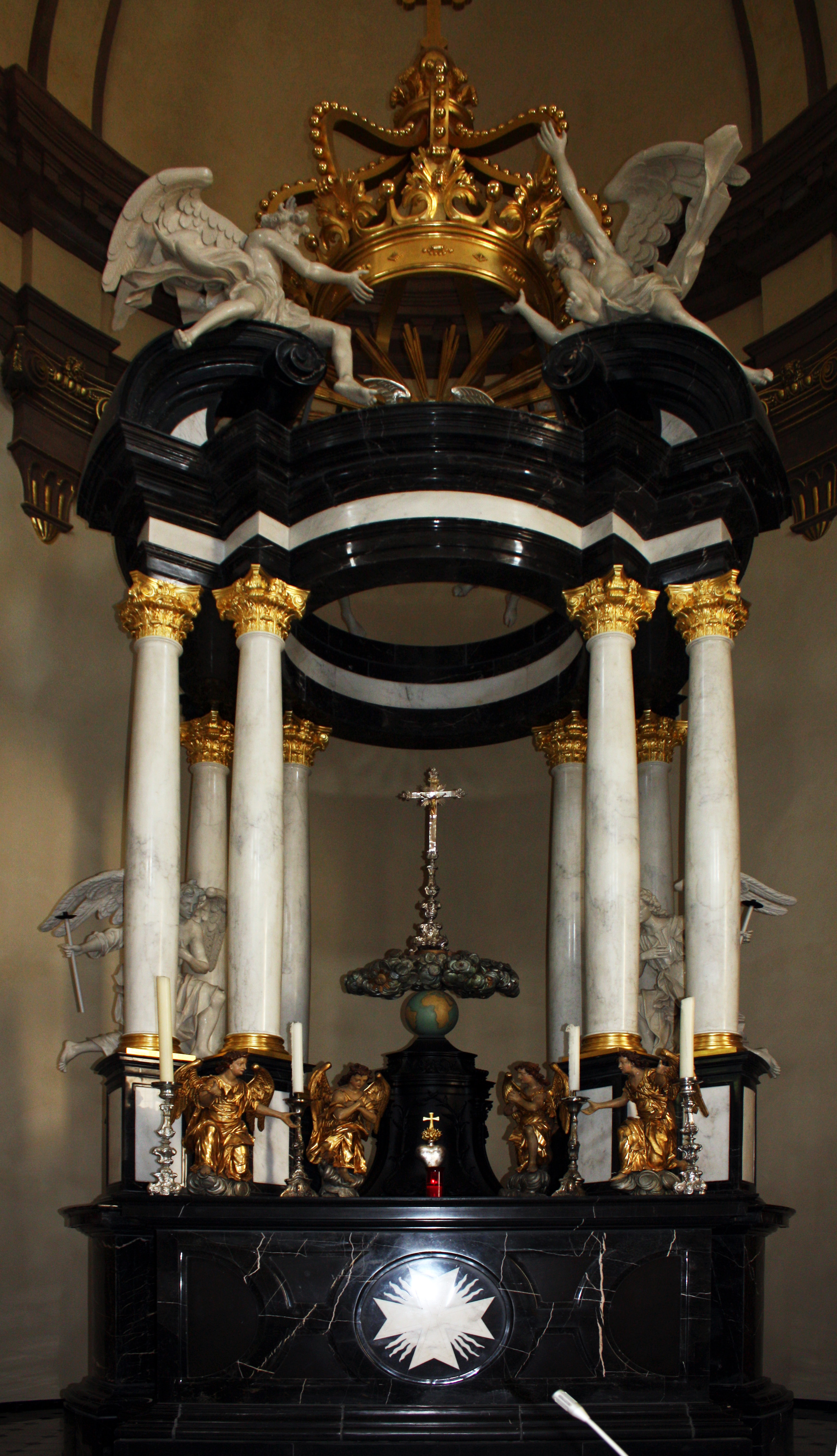 Kolumba-Altar der Ursulinenkirche in Köln. Der ehemals in St. Gereon Köln stehende Altar wurde 1717/19 von dem Künstler Johann Franz von Helmont geschaffen. Er ist Ersatz für den im Krieg zerstörten Altar der Kirche Corpus Christi